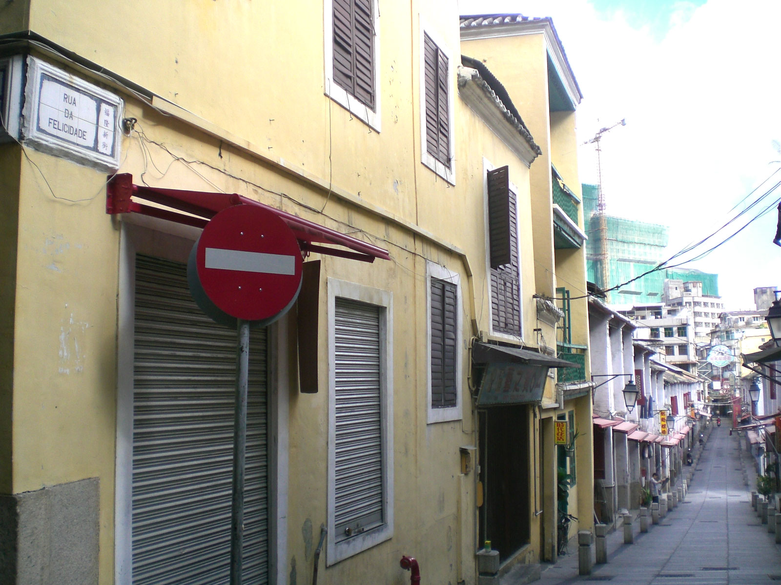 福隆新街，(Rua da Felicidade)